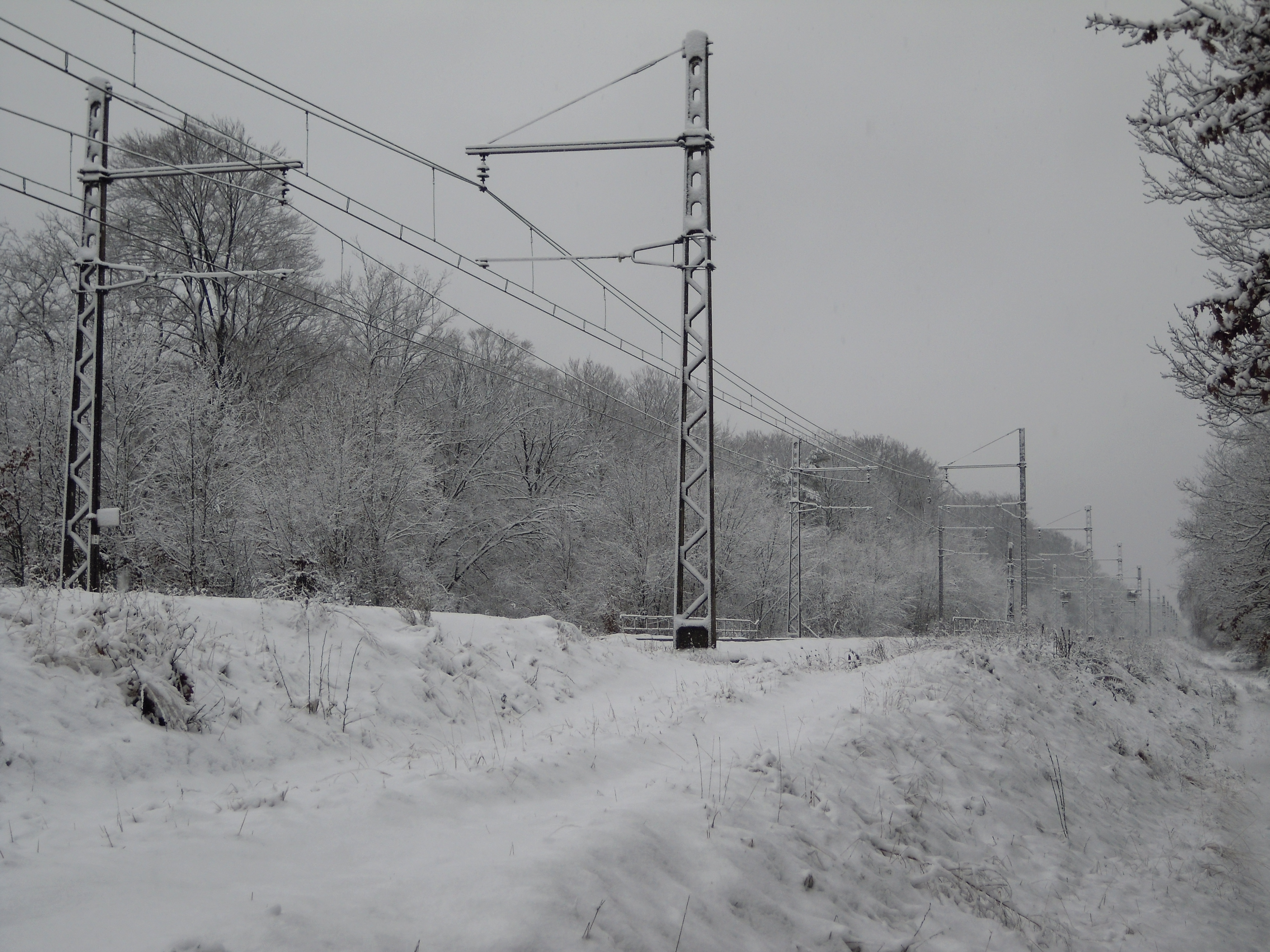 Caténaire 1500 V enneigée entre Bois-le-Roi et Fontainebleau (PK 55 de la ligne PLM).